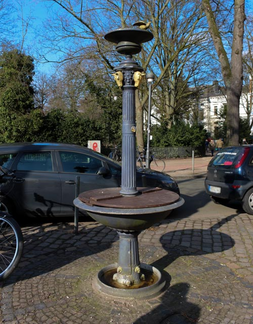 Abbildung des Pferdebrunnen I. Noch vollständig erhalten. GPS: 53°4'21" N 8°48'59" E